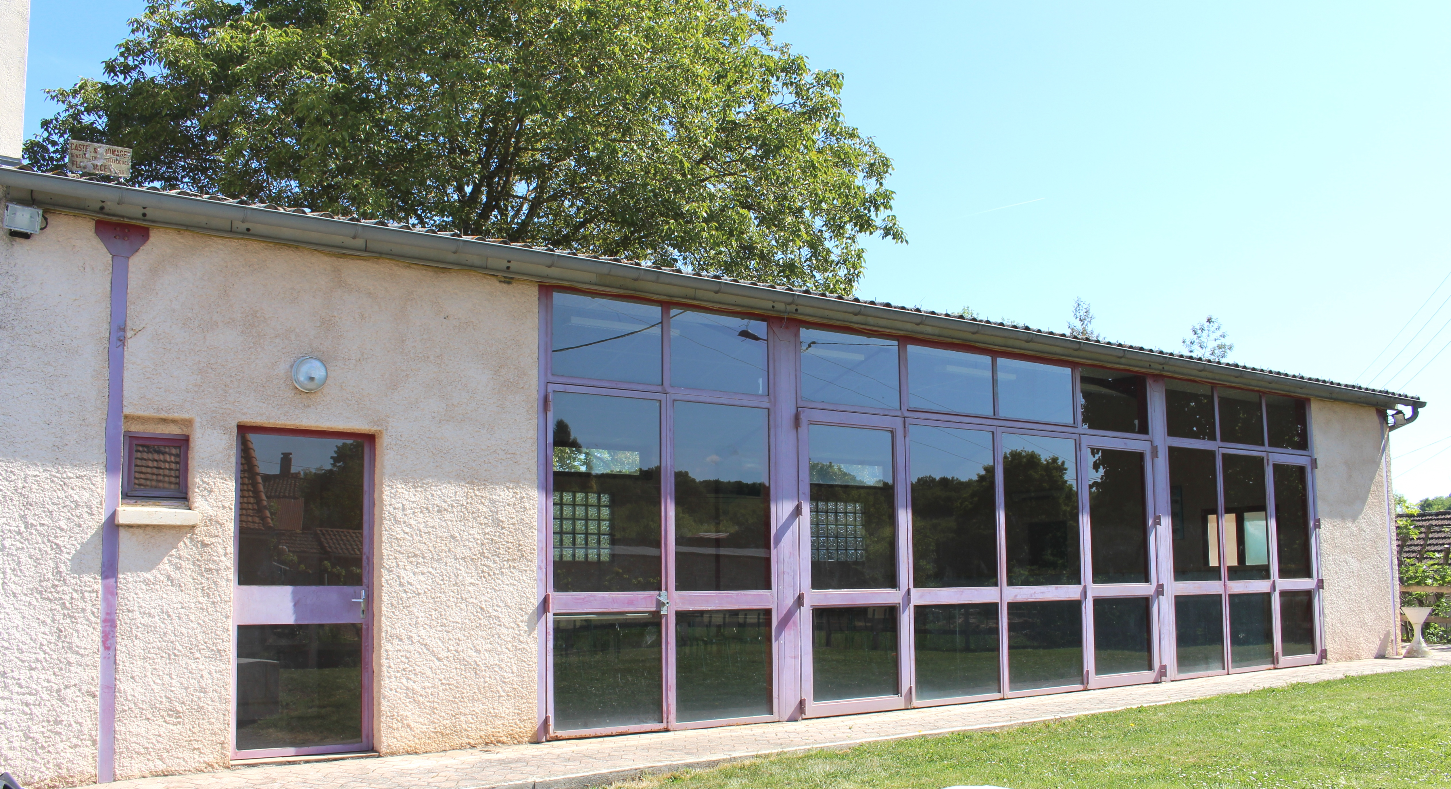 Salle des fêtes de Lhez (Hautes-Pyrénées)